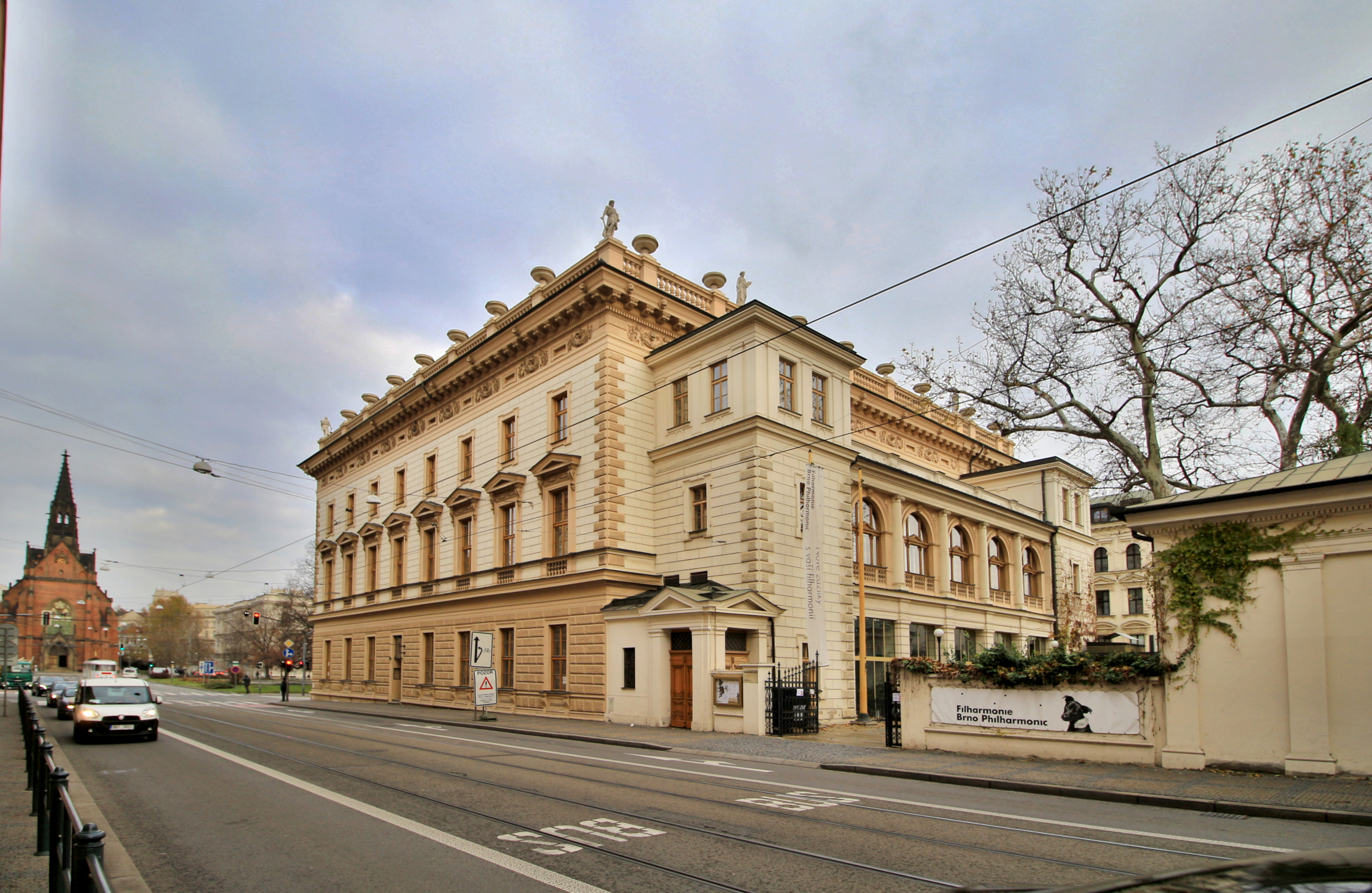 Besední dům, Brno